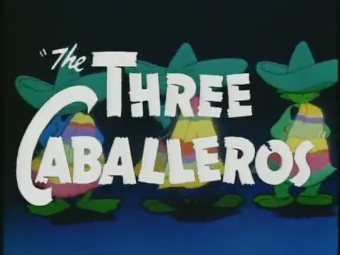 Imatges del tràiler de la pel·lícula "Los Tres Caballeros". Els tràilers de les pel·lícules publicats abans de 1964 als Estats Units es troben en domini públic